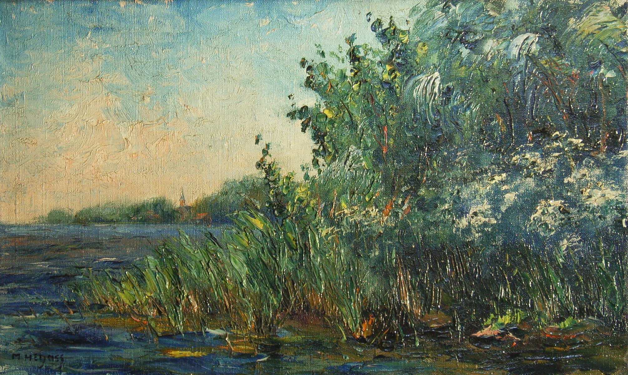 Eigen foto van schilderij Rietkraag nabij De Kaag van Marinus Heijnes, (privébezit)